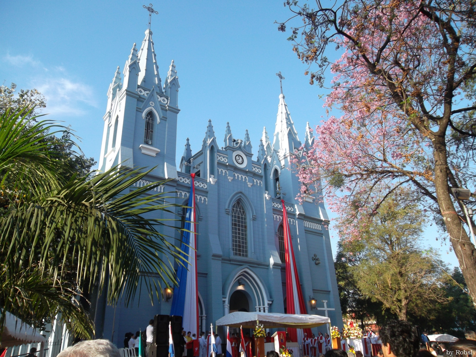 Durante misa del 10 de Agosto del 2012